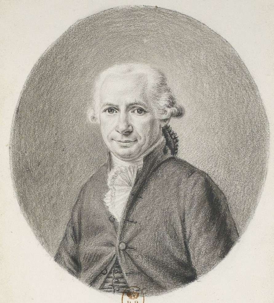 Mr Mourot : professeur de droit français, deputé du Bearn